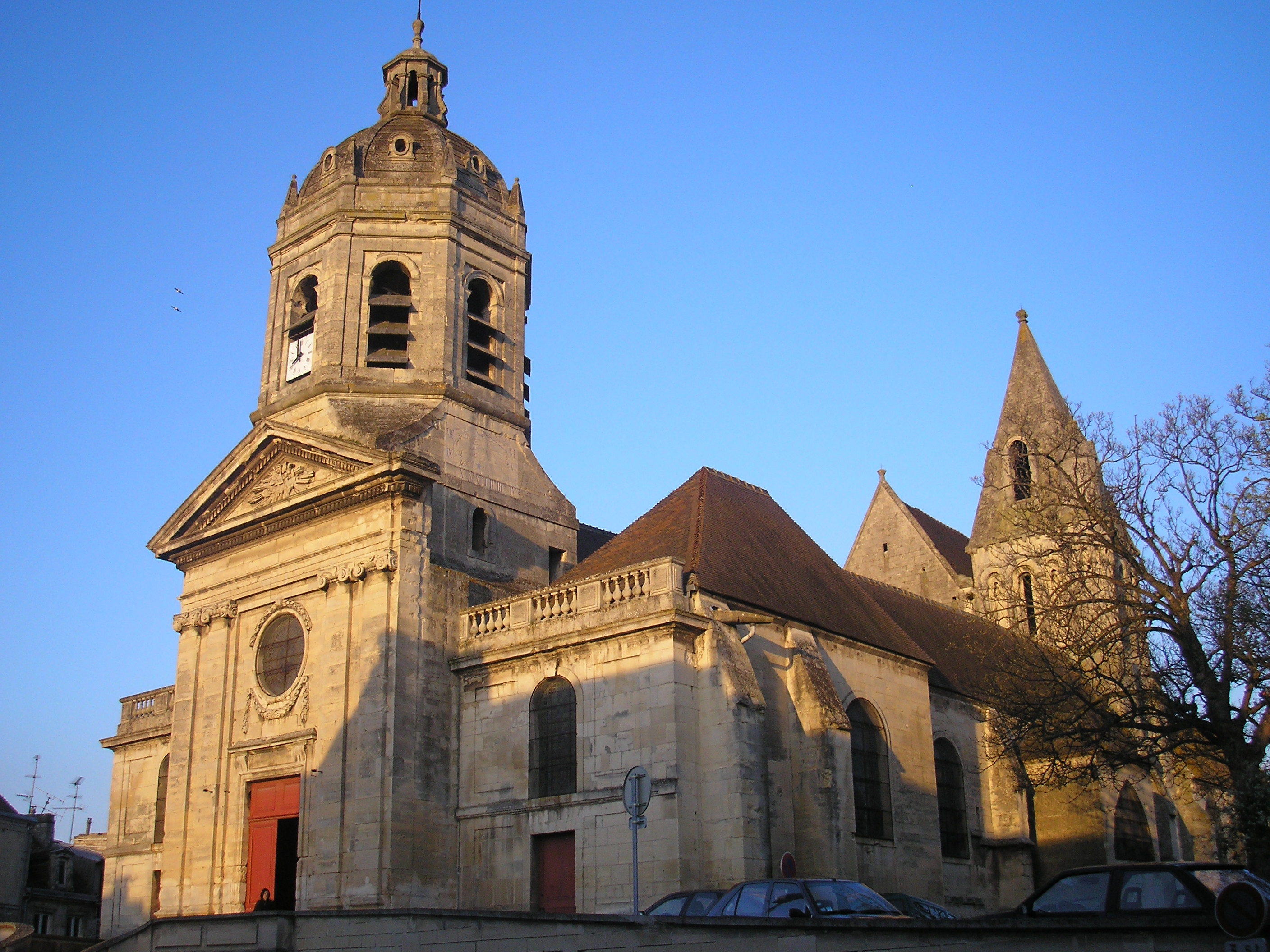 Caen (Normandie, France). L'église Saint-Michel-de-Vaucelles.